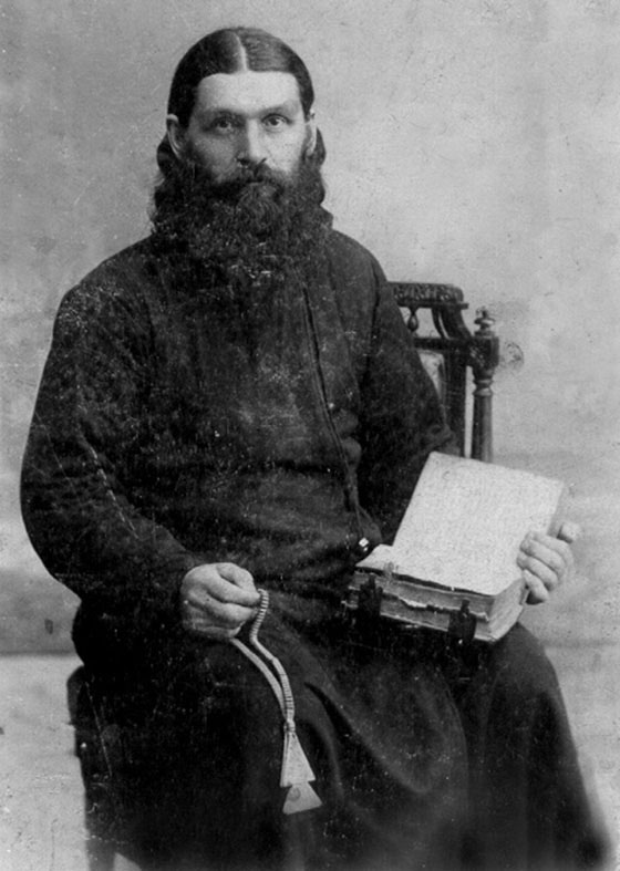 Отец Георгий Лакомкин.1910-е гг.